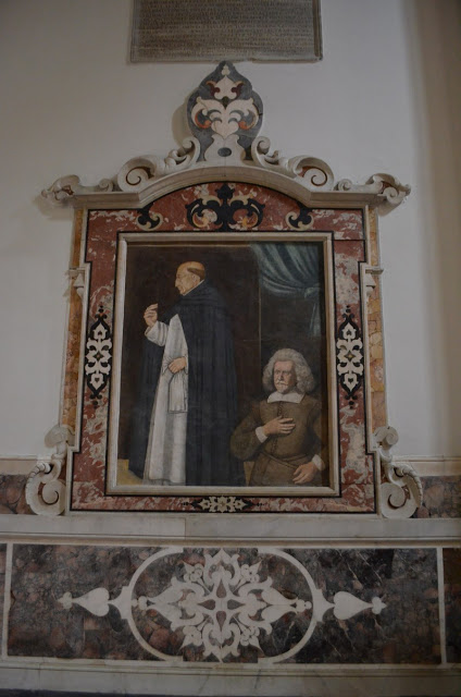 Beato Guido Maramaldo e Carlo della Gatta (Antonio Solario - 1508 / autore ignoto del XVII sec.)